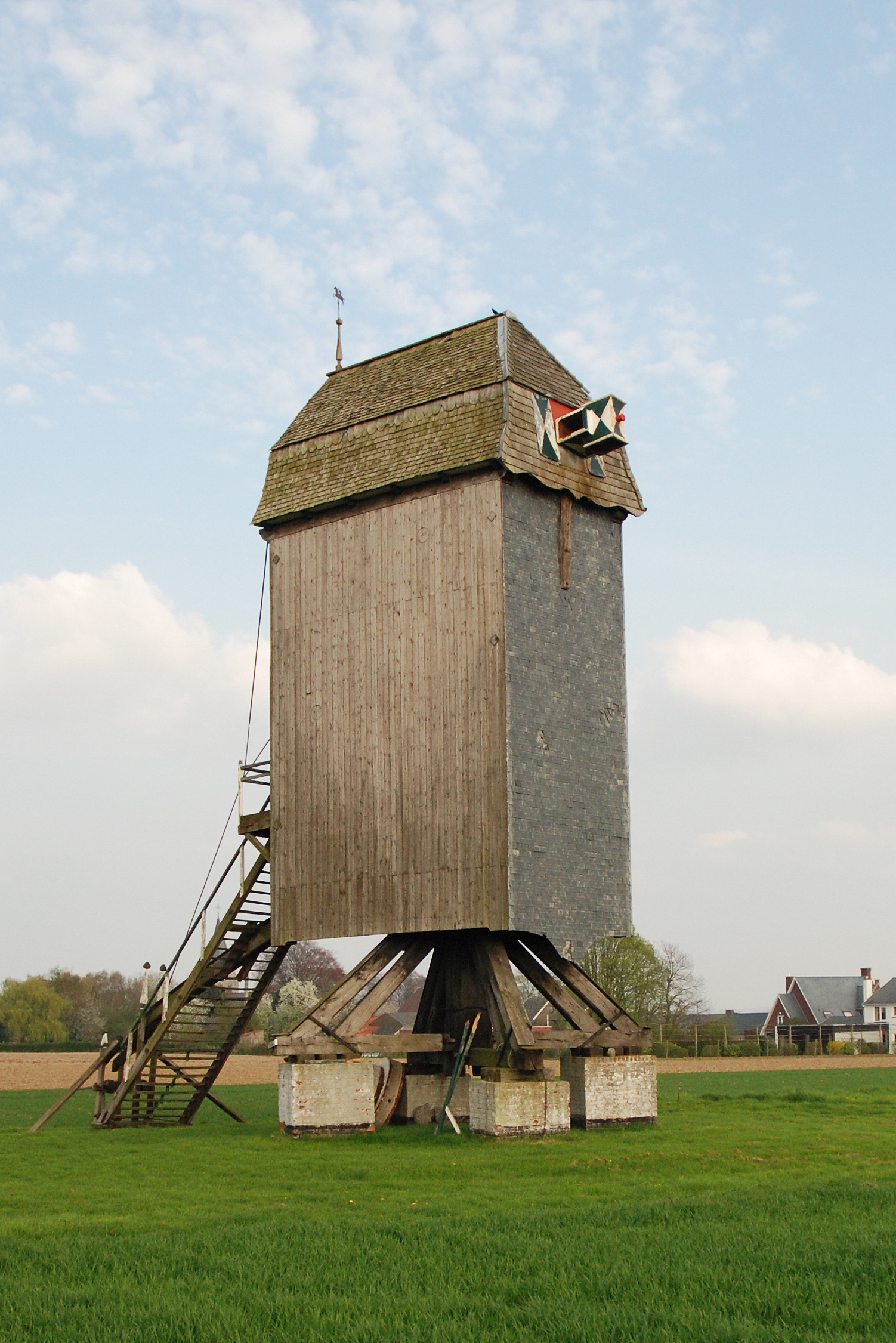 De Huisekoutermolen te Huise, België